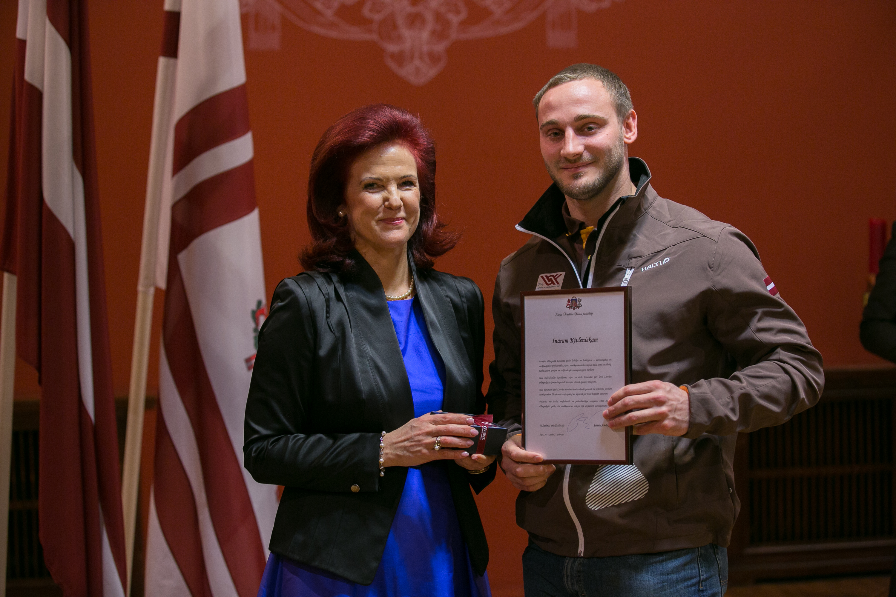 2014.gada 27.februāris. Saeimas priekšsēdētāja Solvita Āboltiņa tiekas ar Latvijas olimpisko komandu XXII Ziemas olimpiskajās spēlēs Sočos. Foto: Ernests Dinka, Saeimas Kanceleja Izmantošanas noteikumi: saeima.lv/lv/autortiesibas Solvita Āboltiņa tiekas ar Latvijas olimpisko komandu XXII Ziemas olimpiskajās spēlēs Sočos.